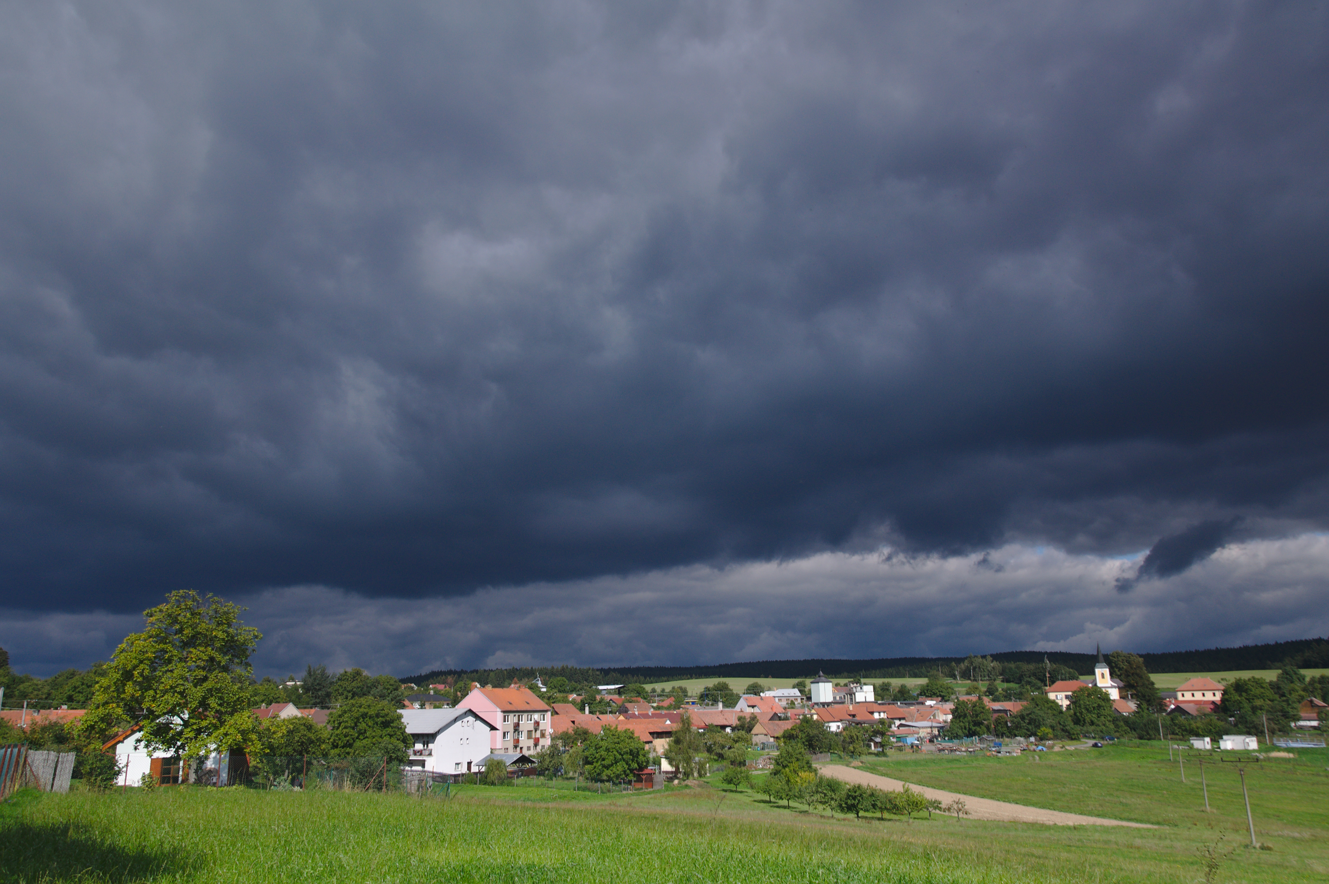 Pohled na obec od jihovýchodu, Bedřichov, okres Blansko